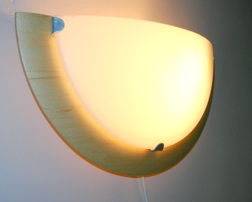 Lampa (kinkiet) wykonana ze sklejki A lamp made out of plywood